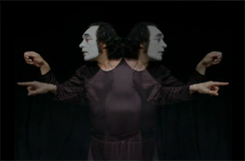 Pantomim sanatçısı Ulvi Arı'nın bir performansı